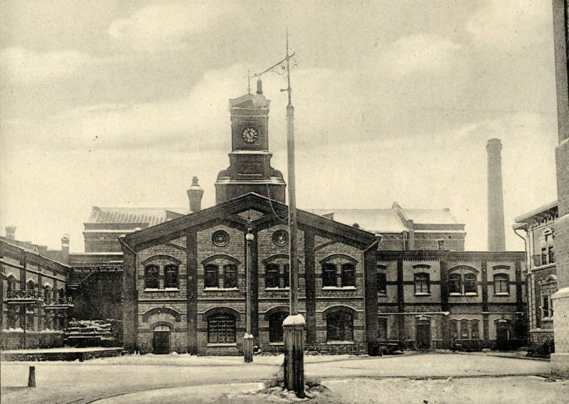 Самара. Жигулевский пивоваренный завод Альфреда Вакано. Конец XIX - начало XX века.